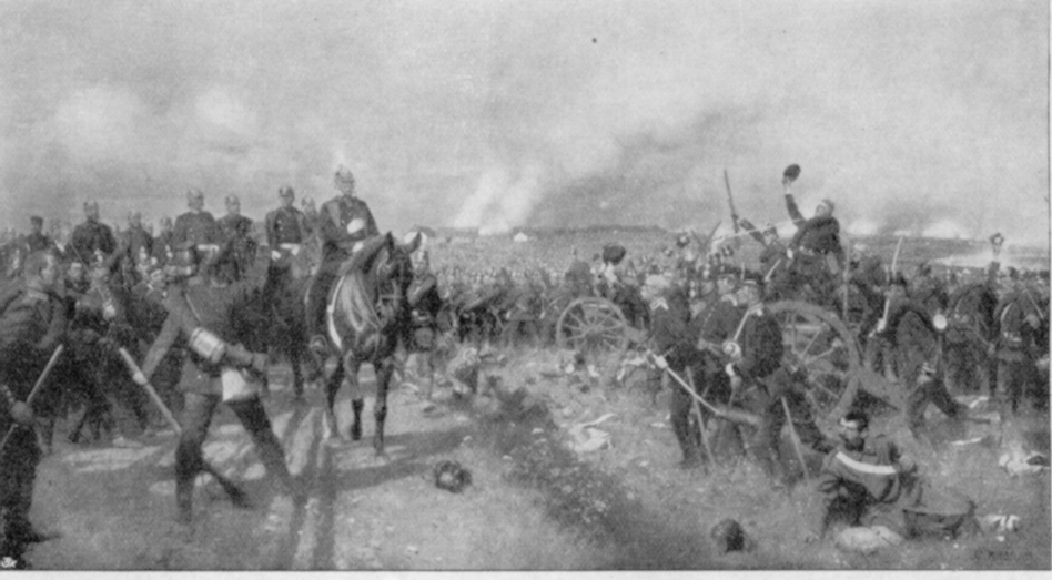 Begrüßung von König Wilhelm I. durch den Kommandanten der 4. Kopanie des Gardeschützen-Bataillons, Hauptmann v. Gélieu, nach dem gefecht bei Lipa 1866